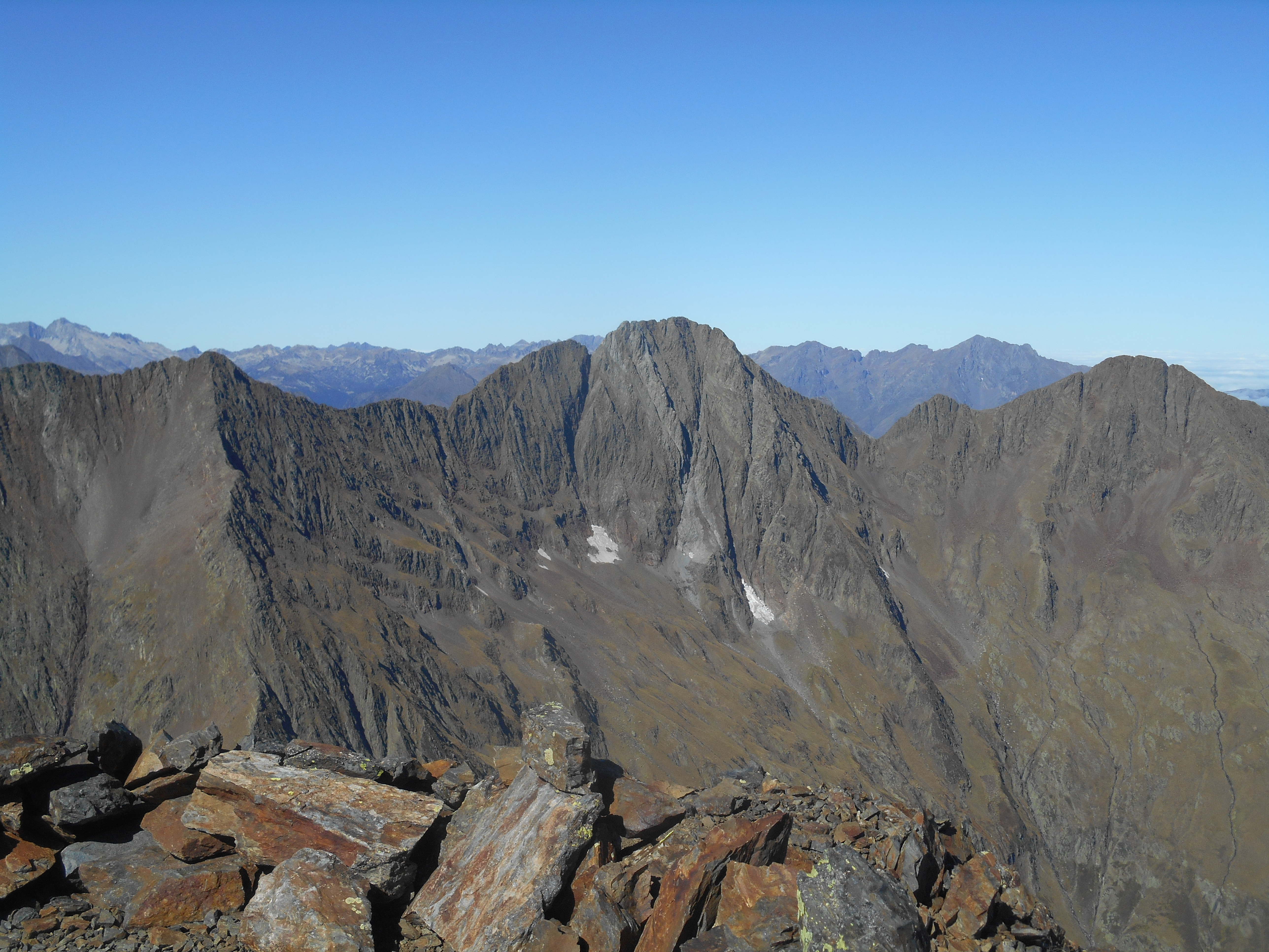 Face Est du Pic de Lustou depuis le Pic du Port de la Pez, octobre 2019